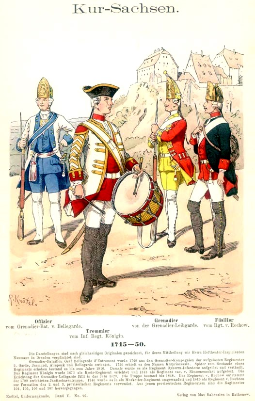 Sächsische Armee: Artillerie, Pioniere und Train: siehe Beschriftung auf Grafik